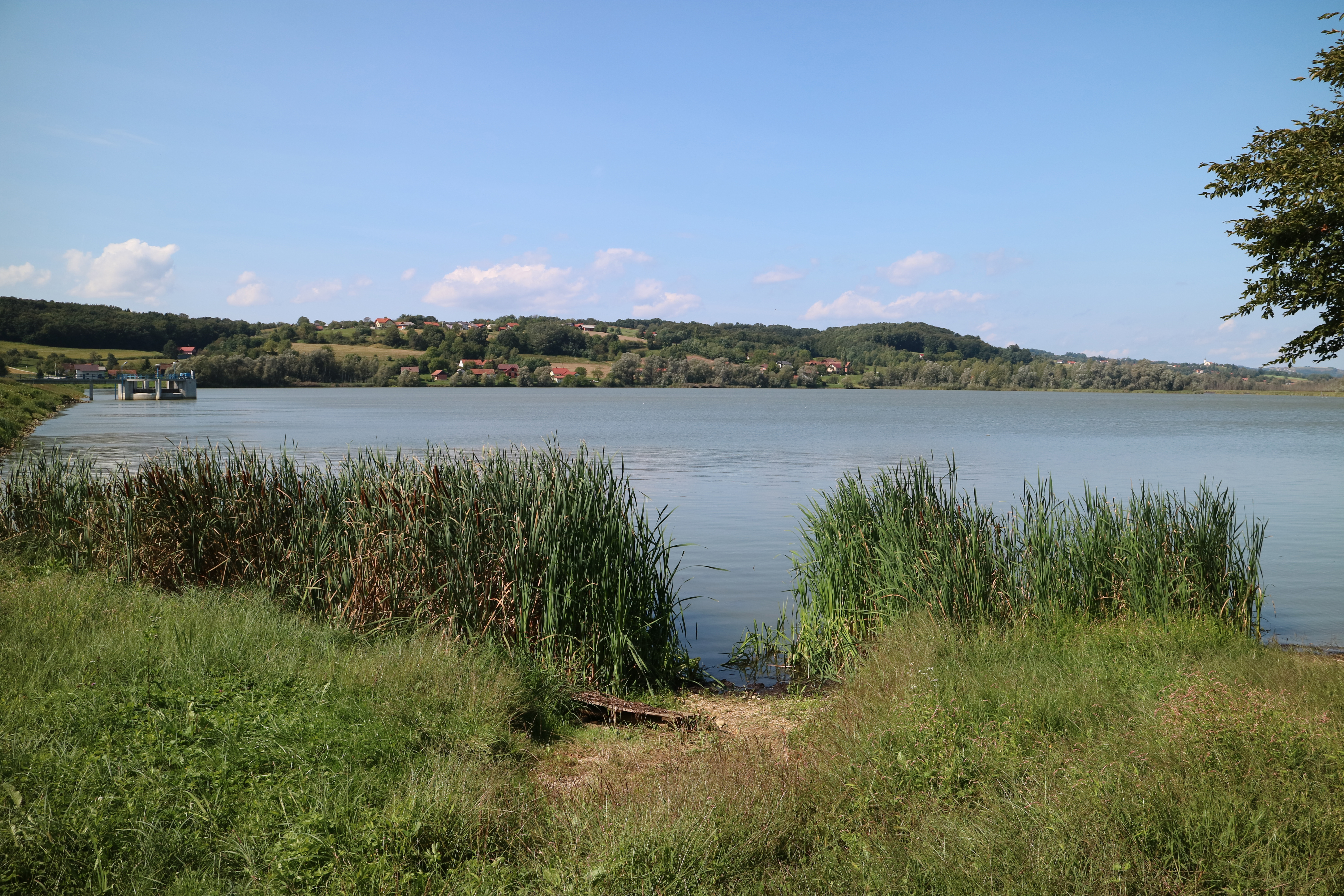 Ledavsko jezero von Südosten, Gemeinde Cankova, Slowenien